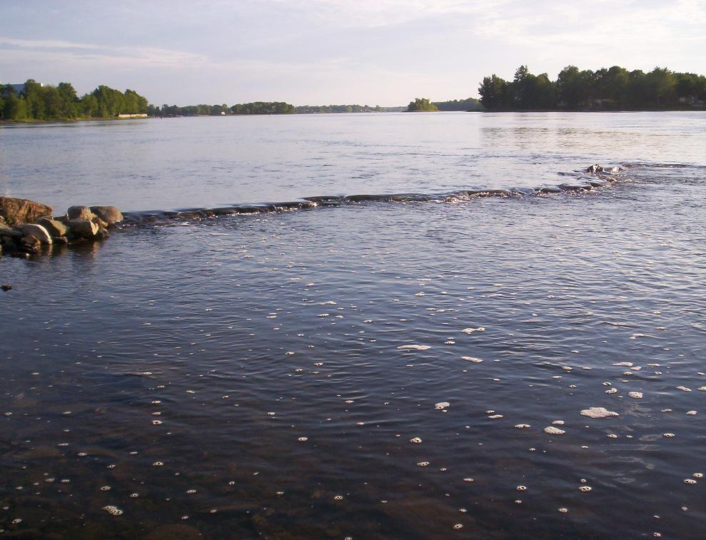 wild river garden 01